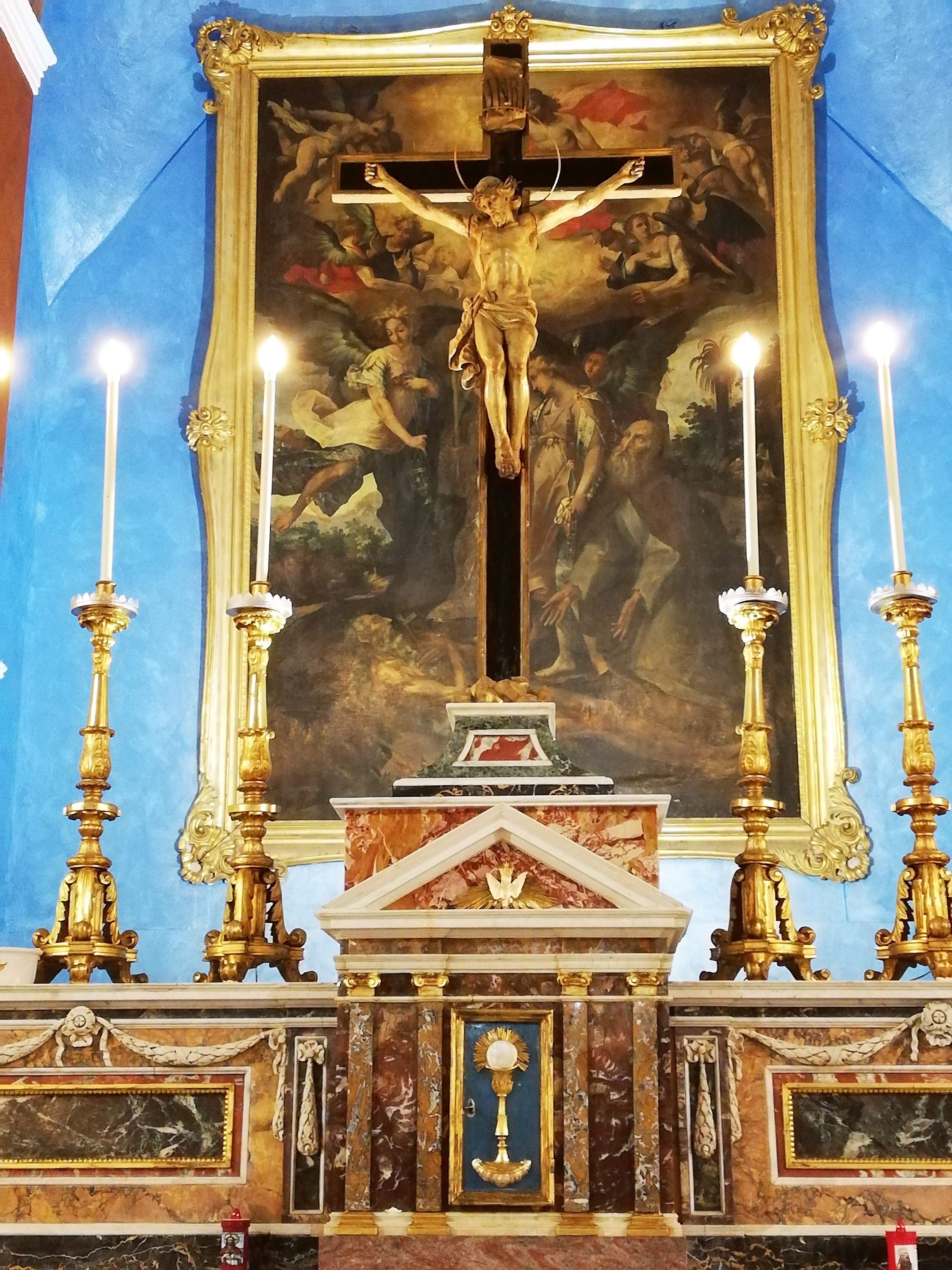 Dipinto dello "Zoppo di Gangi" Gaspare Vazzano raffigurante la Morte di Sant'Onofrio nell'atto dell'ascensione dell'anima nuda al Creatore, attorniato dagli angeli ed assistito dall'abate Pafnunzio.